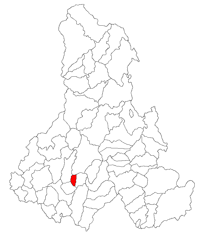 Categorie:Hărţi ale judeţului Harghita Contents 1 Licensing 2 Sursă 3 Licensing 4 Original upload log Licensing Sursă ro::Imagine:Harta_jud_Harghita.png